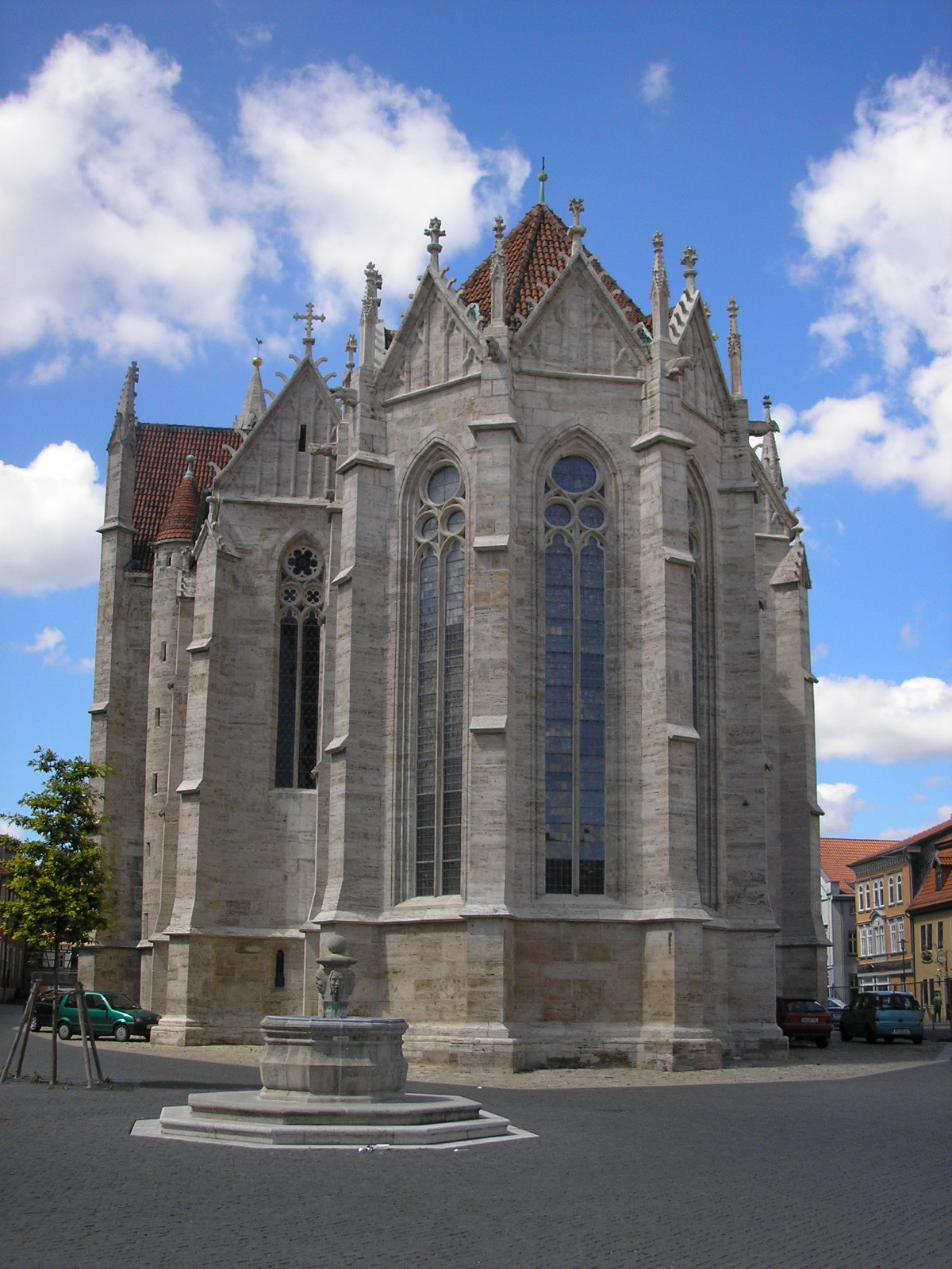 Rückansicht der Blasiikirche in Mühlhausen/Thüringen.